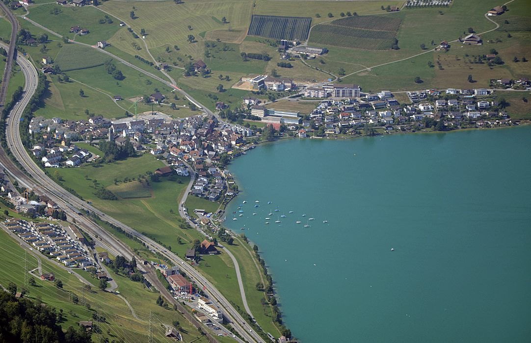 Immensee, Ansicht on Rigi Kulm